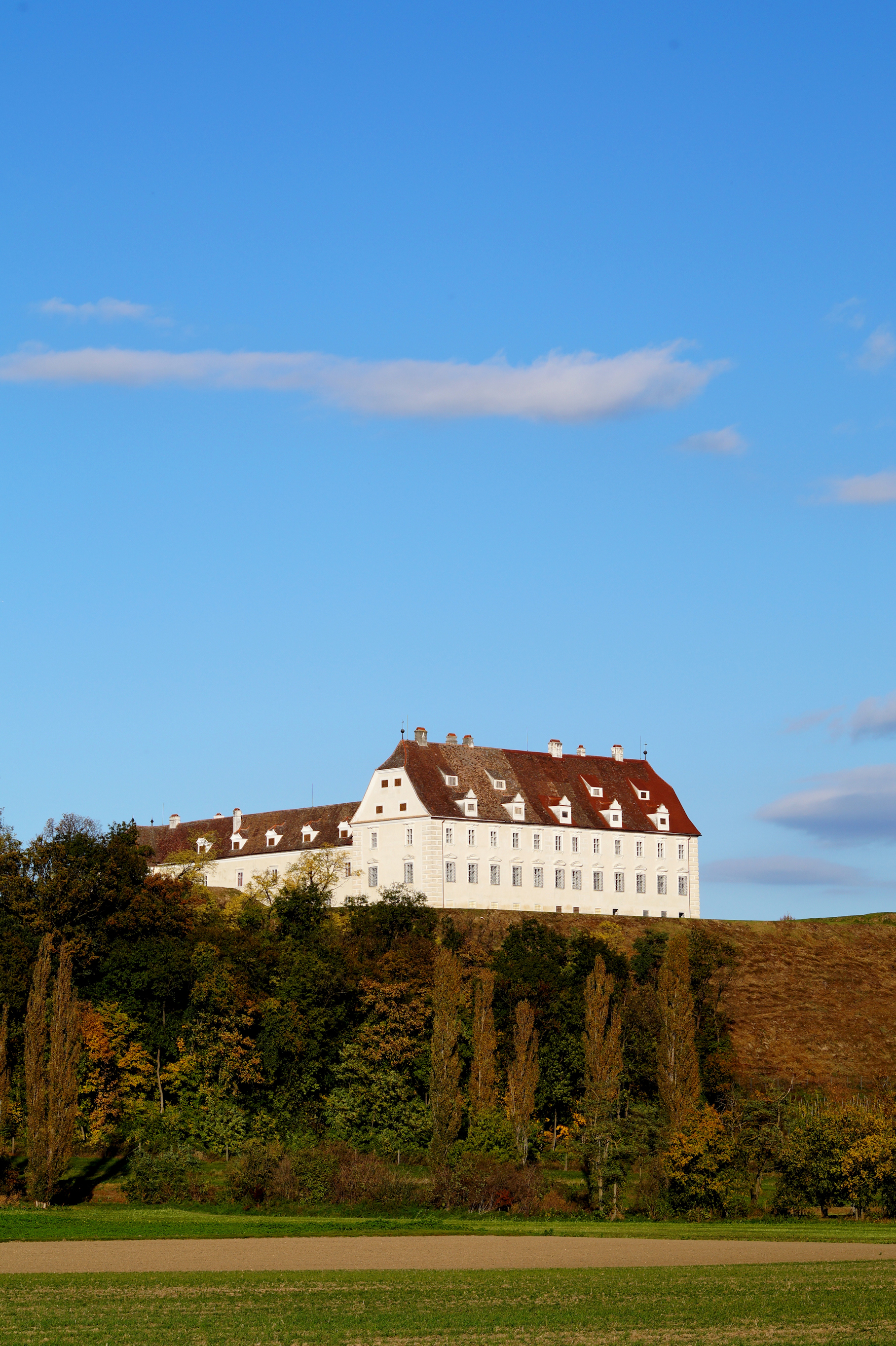 Stetteldorf - Schloss Juliusburg - im Herbst